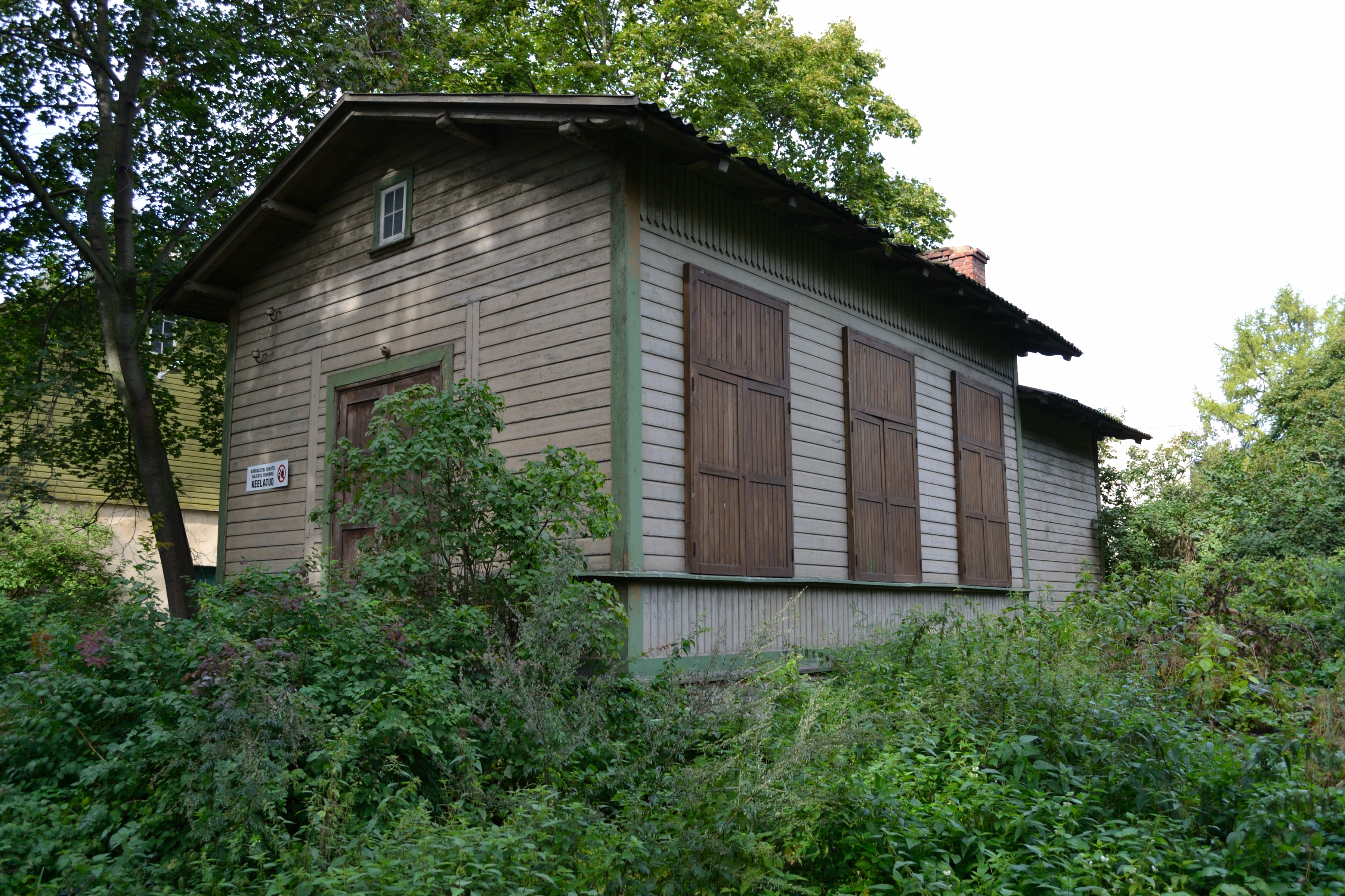 Tallinn, Seewaldi vaimuhaigla surnukuur-kabel Paldiski mnt 52-11 korval, 1903